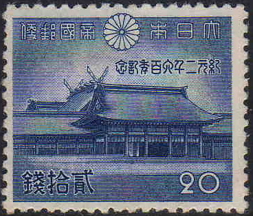 紀元2600年を記念して発行された20銭切手。描かれているのは橿原神宮